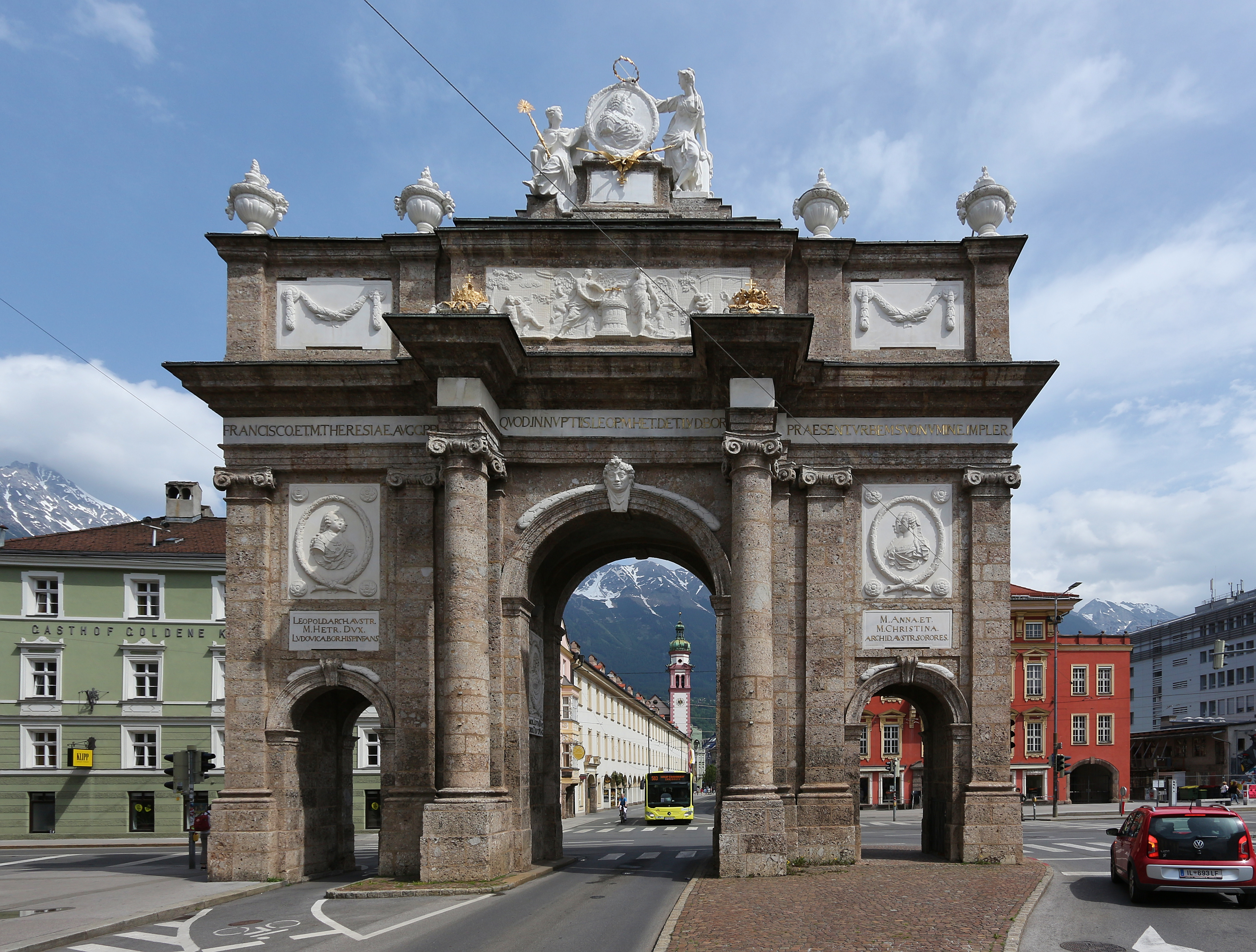 Triumphpforte